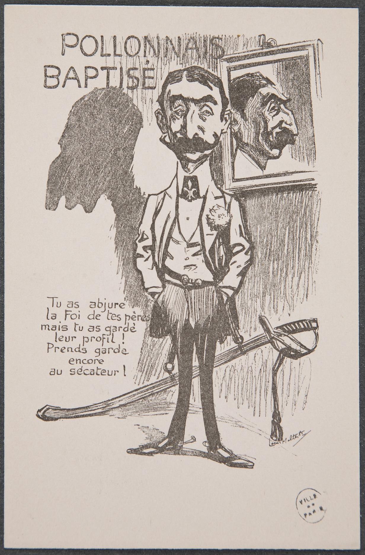 Provenance : Alphonse Ochs (don 1909) ; acq. diverses